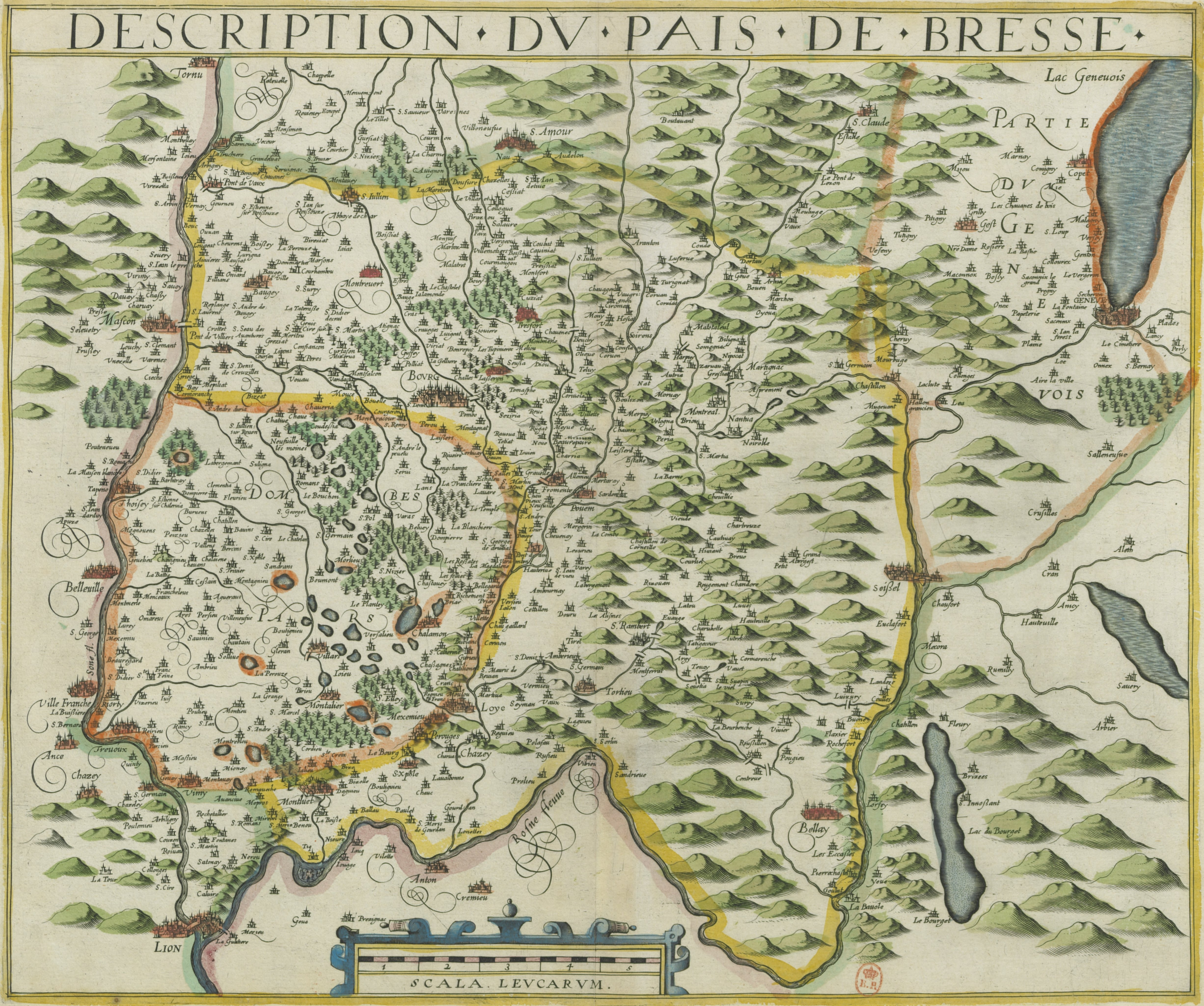 Description du pais de Bresse.